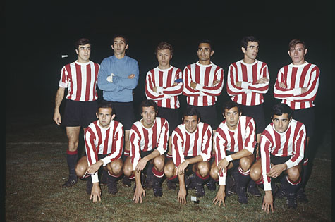 Photo of Estudiantes de La Plata taken in 1968